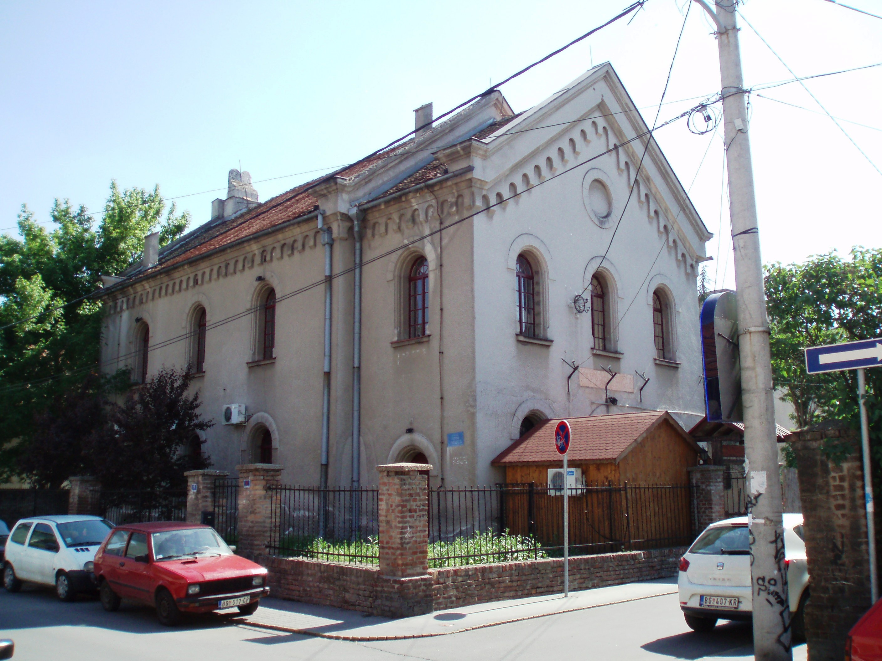 Фотографија Земунске синагоге поглед са угла, аутор фотографије: Nicolo